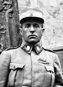 Josef Šnejdárek (1875 - 1945), Český armádní důstojník.